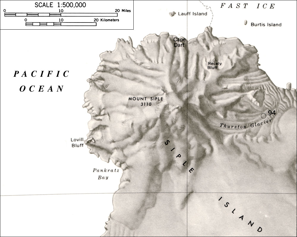 Karte der von Mount Siple im Maßstab 1:1:500,000